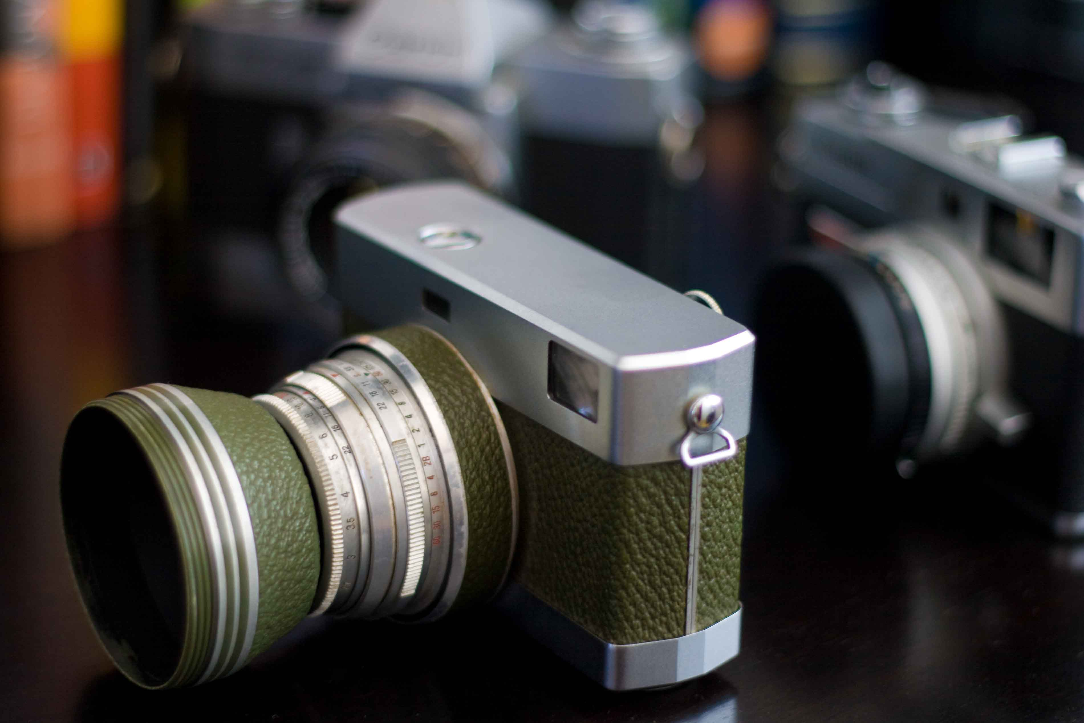 Carl Zeiss Jena Werra 3.